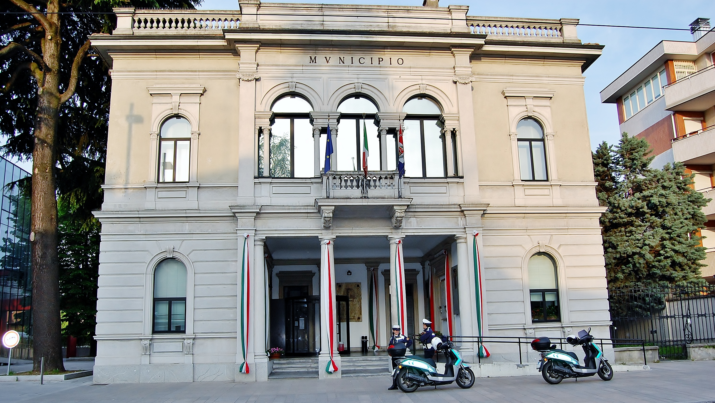 Municipio vecchio di Cinisello (solo esterni) This is a photo of a monument which is part of cultural heritage of Italy.